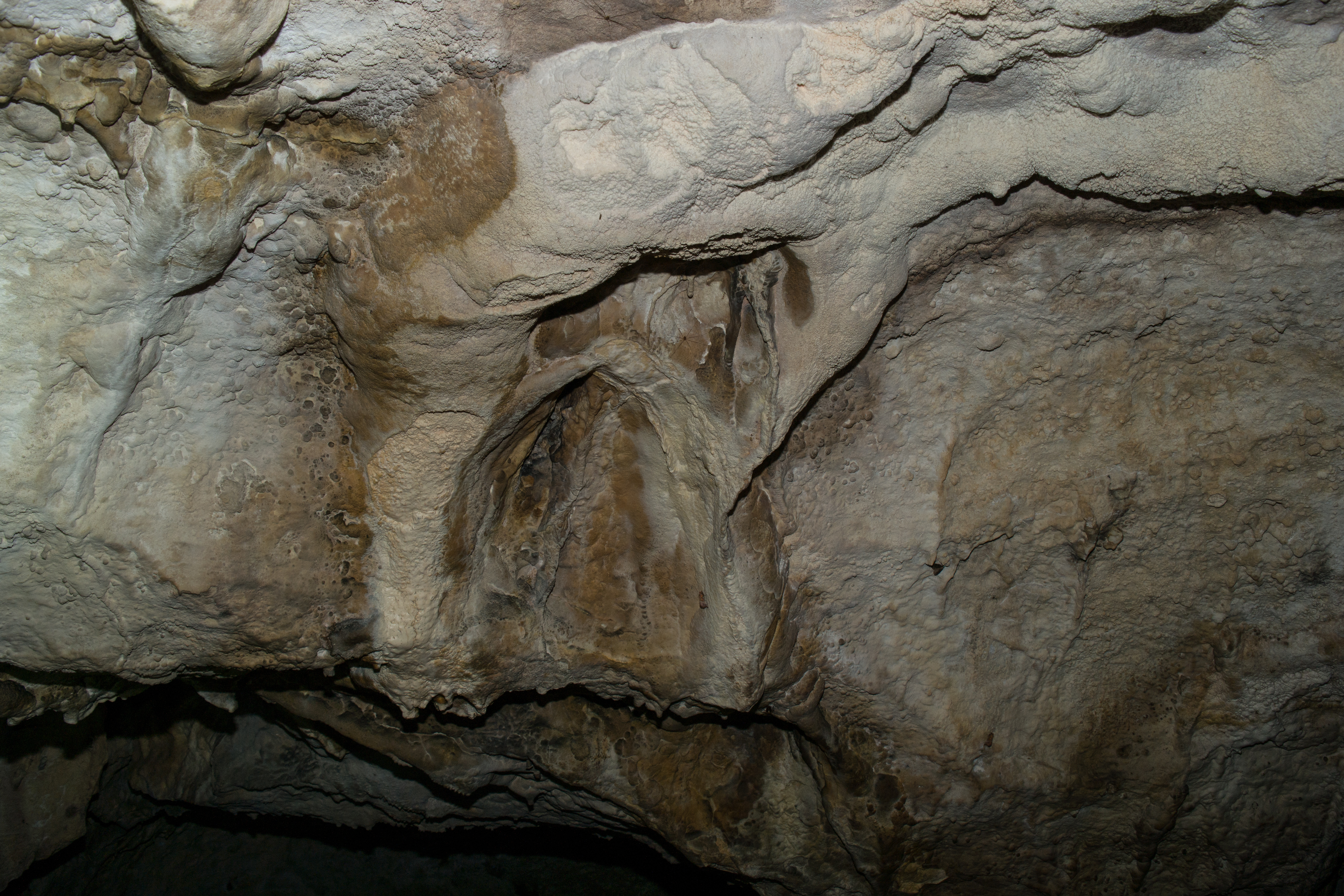 Mondmilch in der Nebenkammer